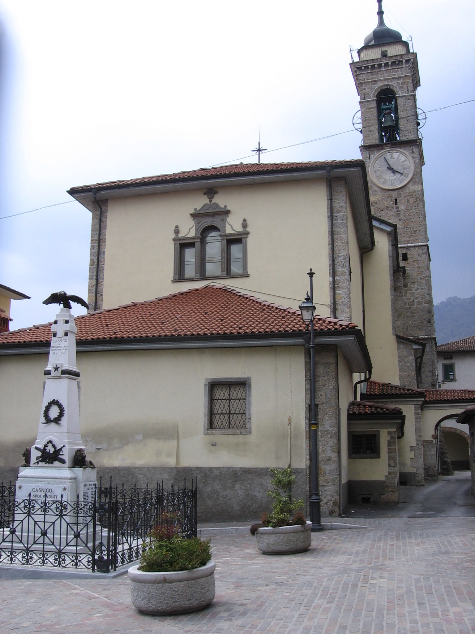 Casnigo, Bergamo, Italia